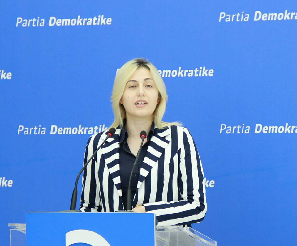 Deklarate per media